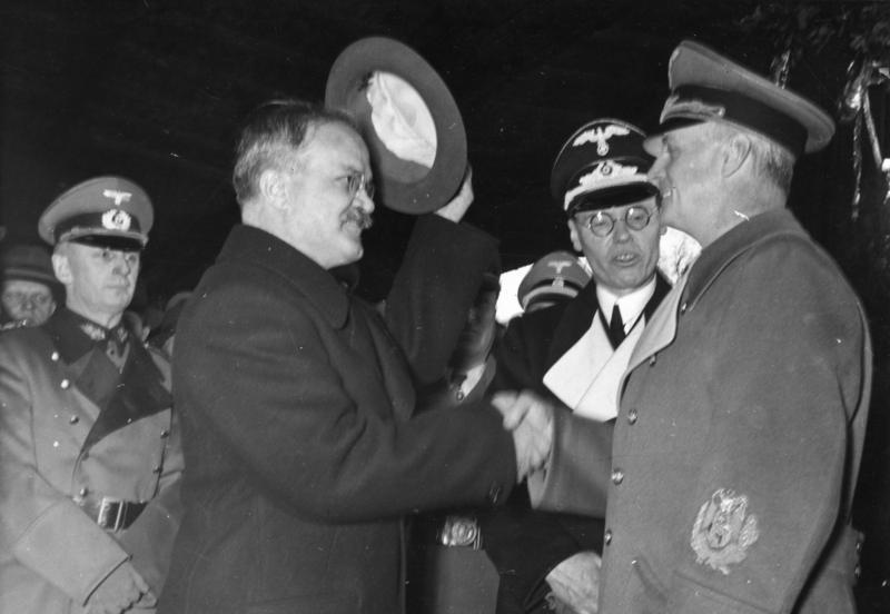 Berlin, Verabschiedung Molotows Der Vorsitzende des Rates der Volkskommissare der UdSSR und Volkskommissar für auswärtige Angelegenheiten, Herr W.M. Molotow verließ heute Vormittag die Reichshauptstadt. U.B.z.: Der sowjetrussische Regierungschef und Außenkommissar verabschiedet sich von dem Reichsminister des Auswärtigen von Ribbentrop auf dem Anhalter Bahnhof. [Mitte: Botschaftsrat Gustav Hilger] Abgebildete Personen: Molotow, Wjatscheslaw Michailowitsch: Außenminister, Sowjetunion (GND 11873461X) Ribbentrop, Joachim von: Außenminister, NSDAP, Deutschland